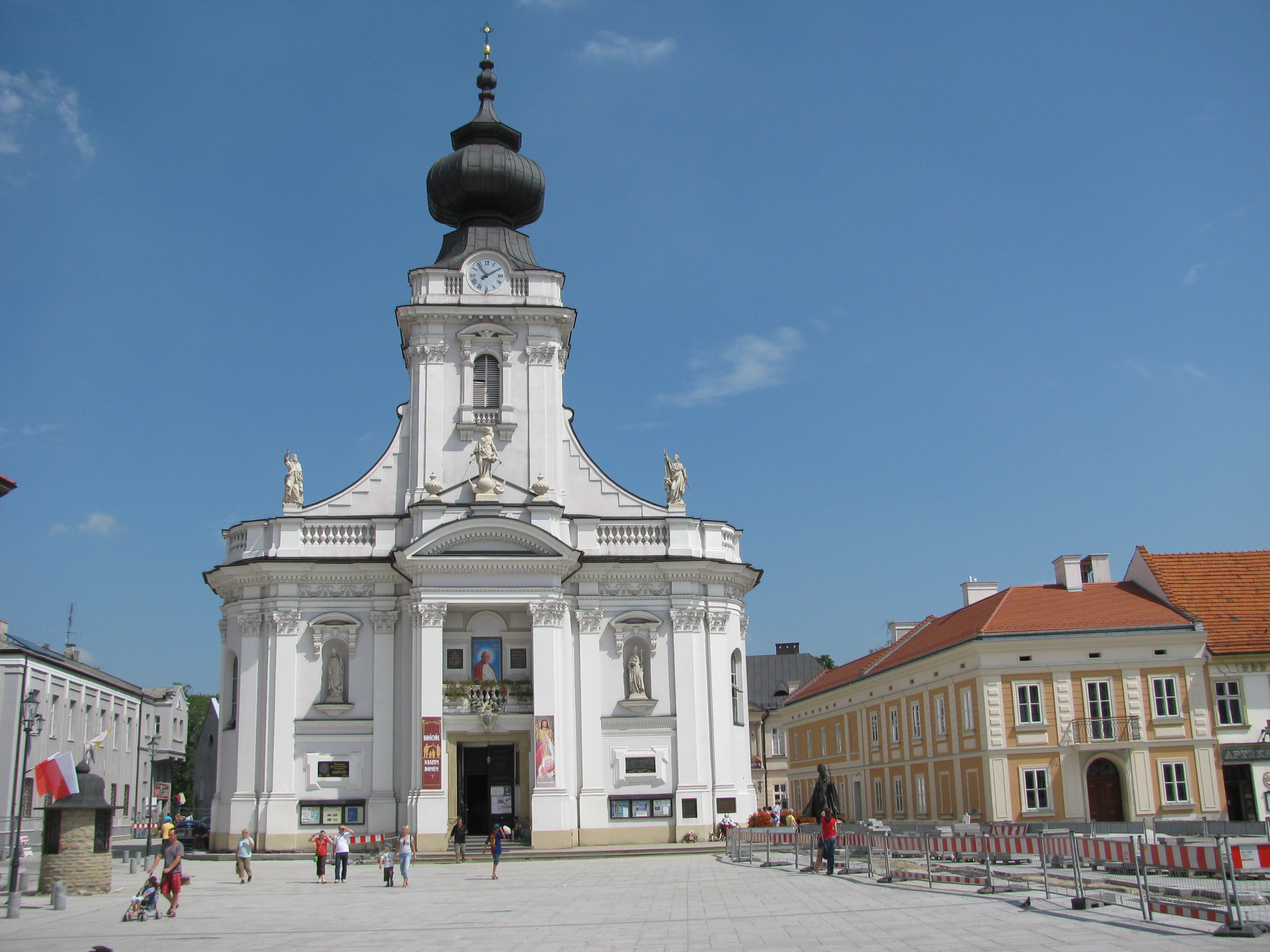 bazylika p.w. Ofiarowania Najświętszej Marii Panny